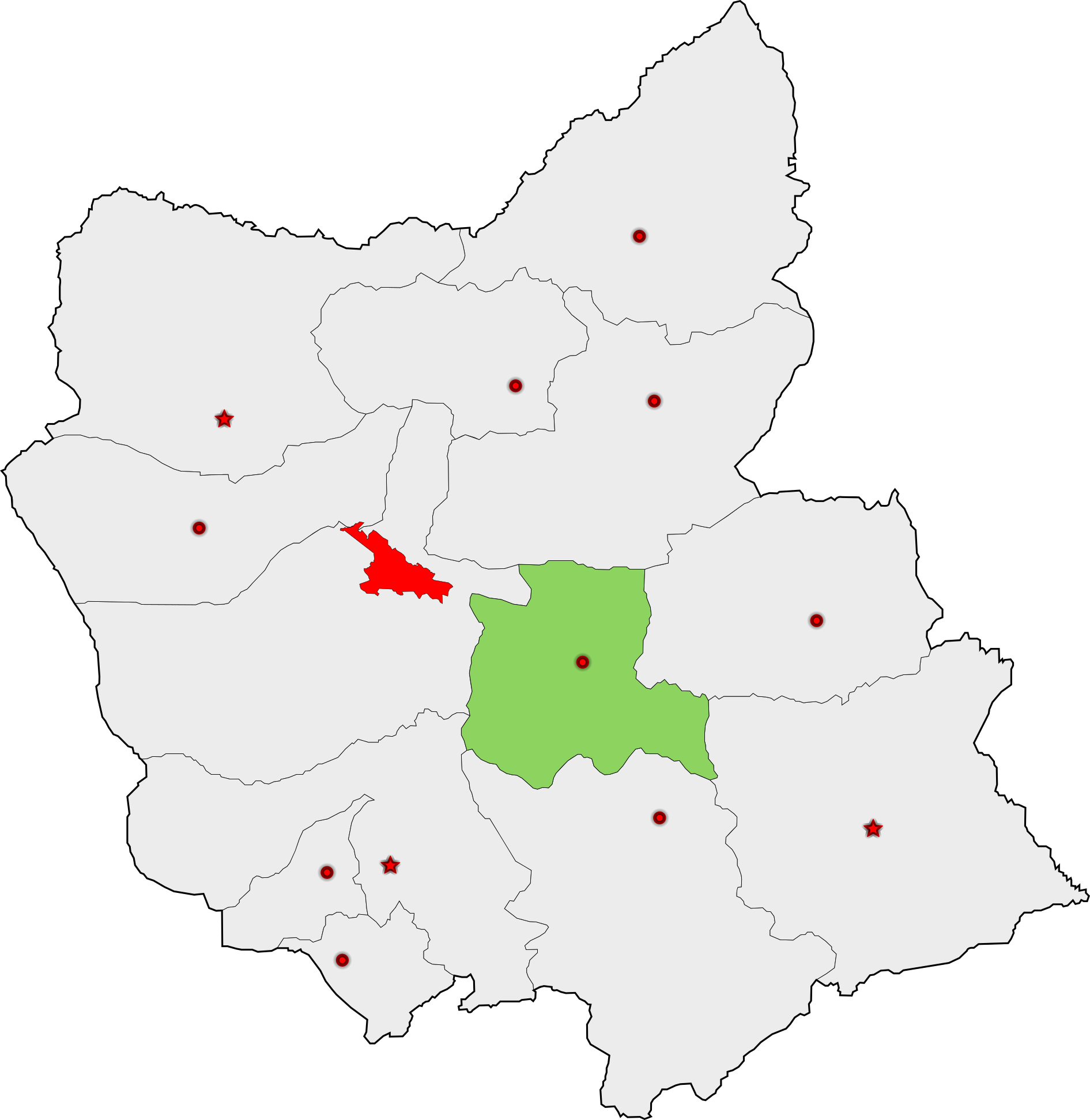 حوزهٔ انتخاباتی بستان‌آباد برای انتخابات مجلس شورای اسلامی